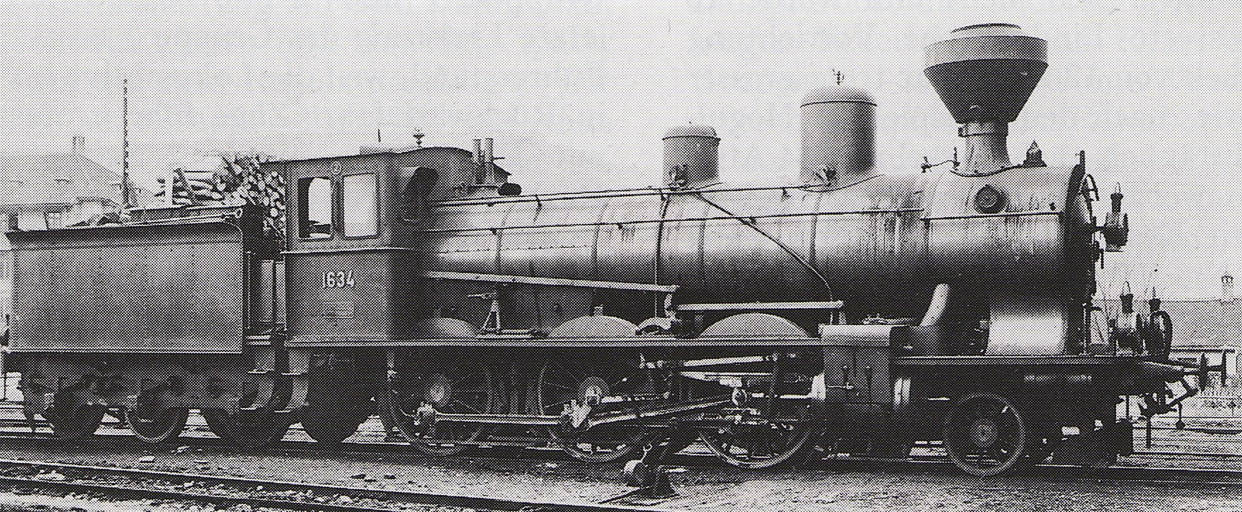 Dampflocomotive B 3/4 Nr. 1634 der Schweizeriſchen Bundesbahnen mit Einrichtung für Holtzfeuerung, bis 1903 Nr. 334 der Jura-Simplon-Bahn, gebaut 1900 inn der Schweizeriſchen Locomotiv- und Machines-Fabrique zů Winterthur (Fabricationsnr. 1243); 1923 außer Dienſt geſtellt und anſchließend abgebrochen.